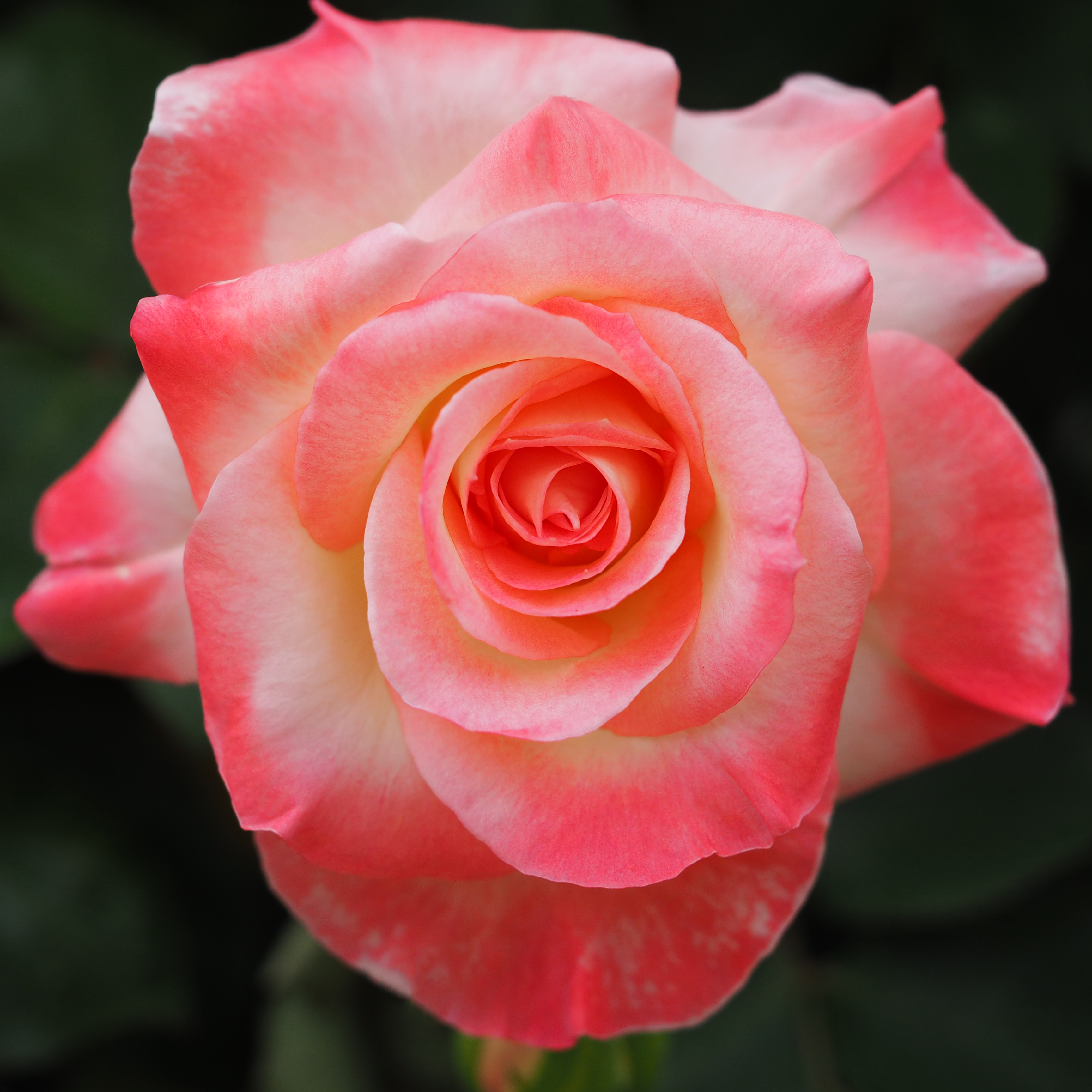 Rose, Elegant Lady ( Diana, Princess of Wales), バラ, エレガント レディ（旧名 ダイアナ プリンセス オブ ウェールズ） Hybrid Tea rose ハイブリッドティーローズ United States of America アメリカ合衆国 Zary 1999